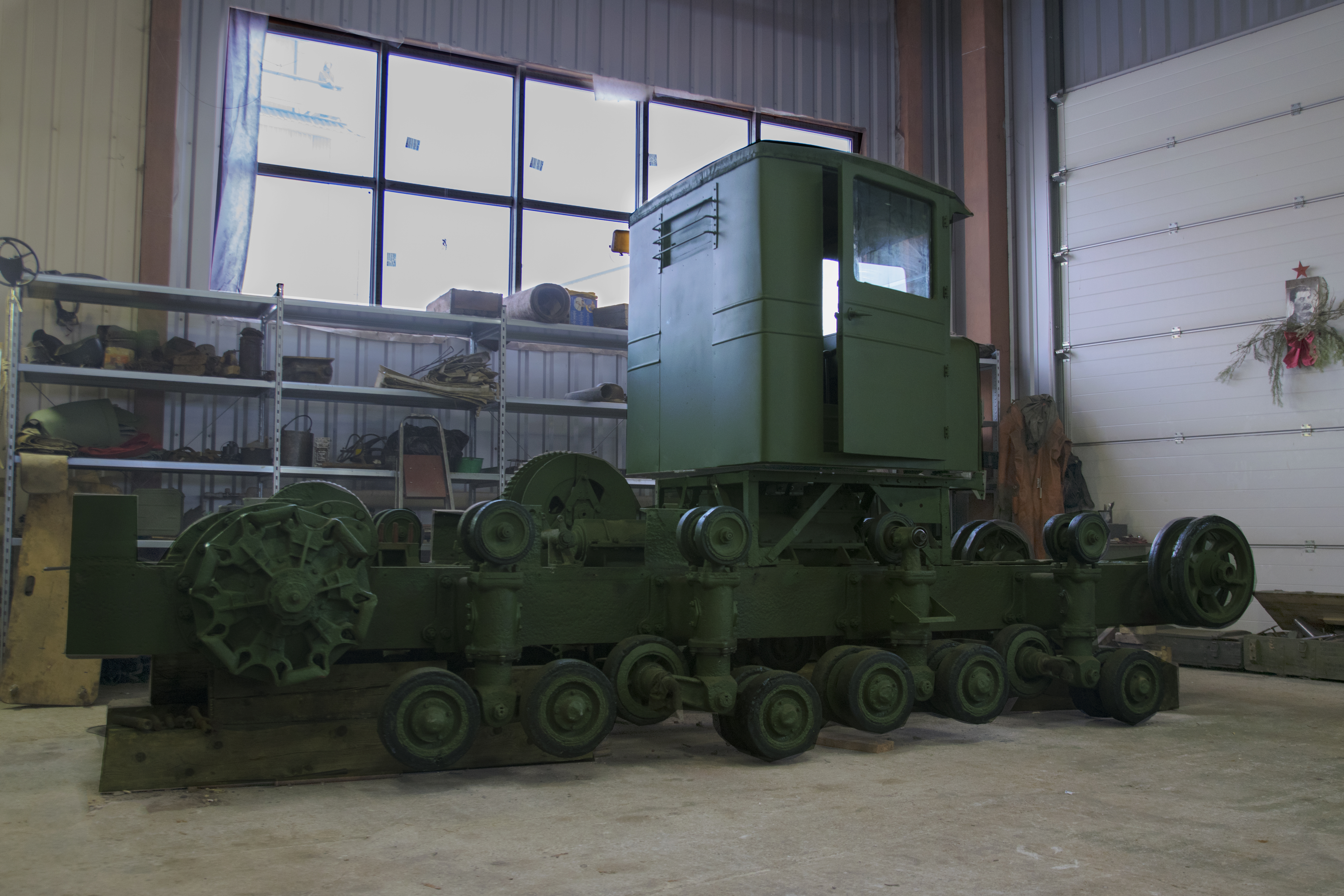 До наших дней сохранился только один тягач «Коминтерн»